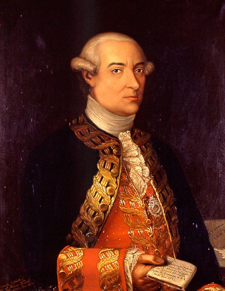 Retrato del capitán general de la Armada Española Manuel Antonio Flórez Maldonado y Martínez de Angulo (1723-1799).